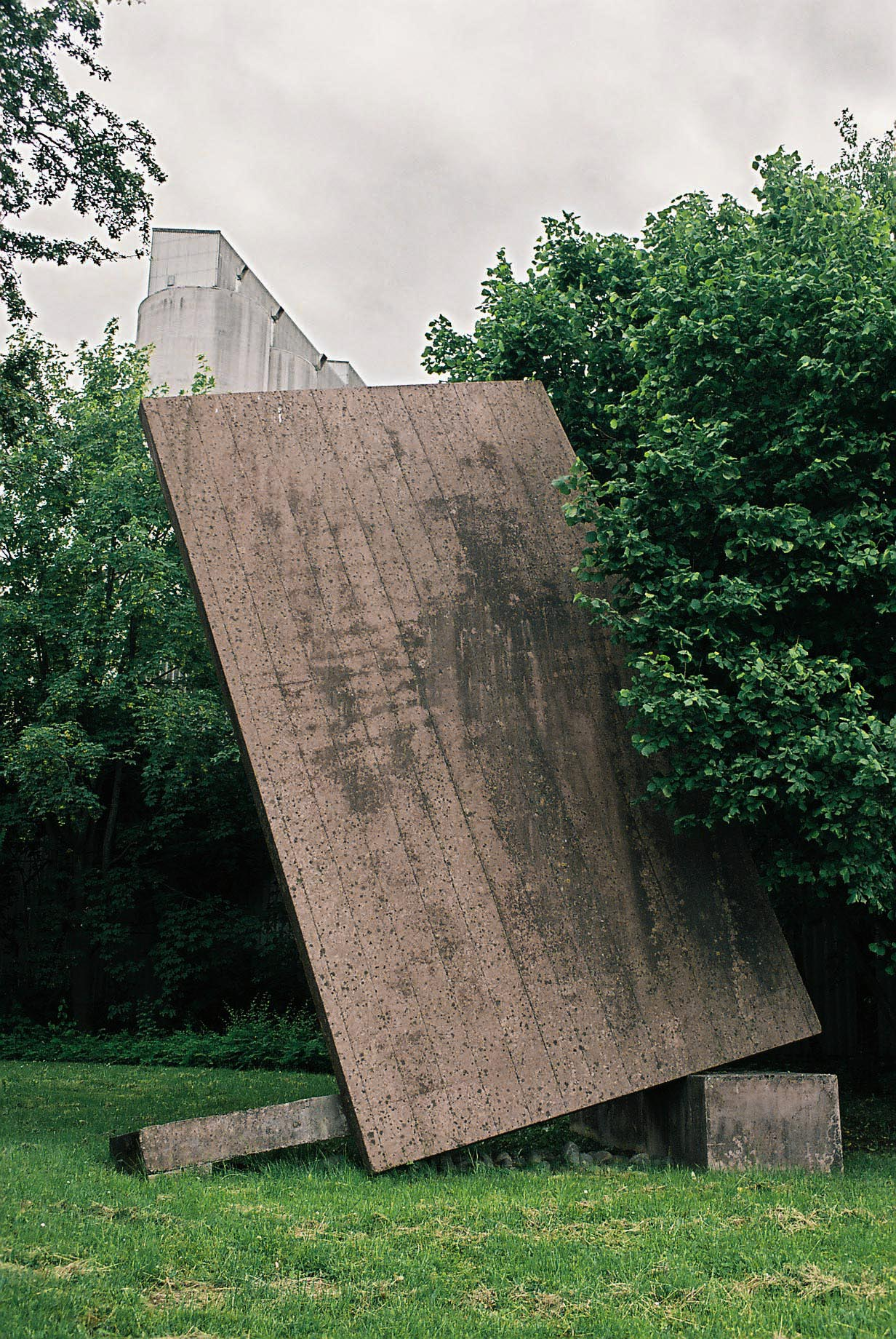 Hetum Gruber, Nichts geht ohne eine Vision davon, 1988, Skulpturenstraße Dotternhausen, Deutschland, Baden-Württemberg, Zollern-Alb-Kreis